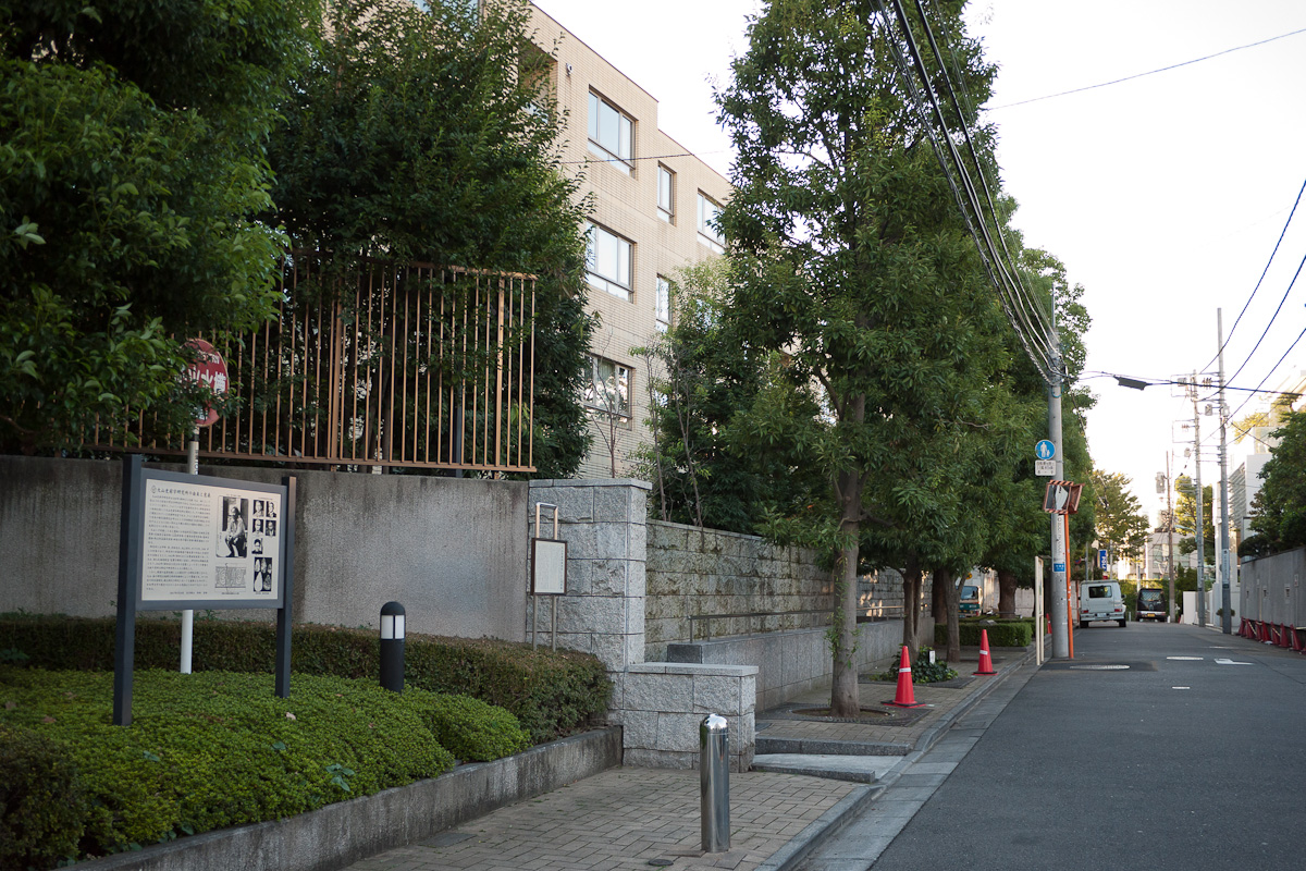 大山柏邸、大山史前学研究所跡（神宮前5丁目緑地）、東京都渋谷区神宮前5丁目。